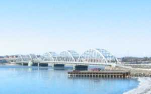 Vildsundbroen.